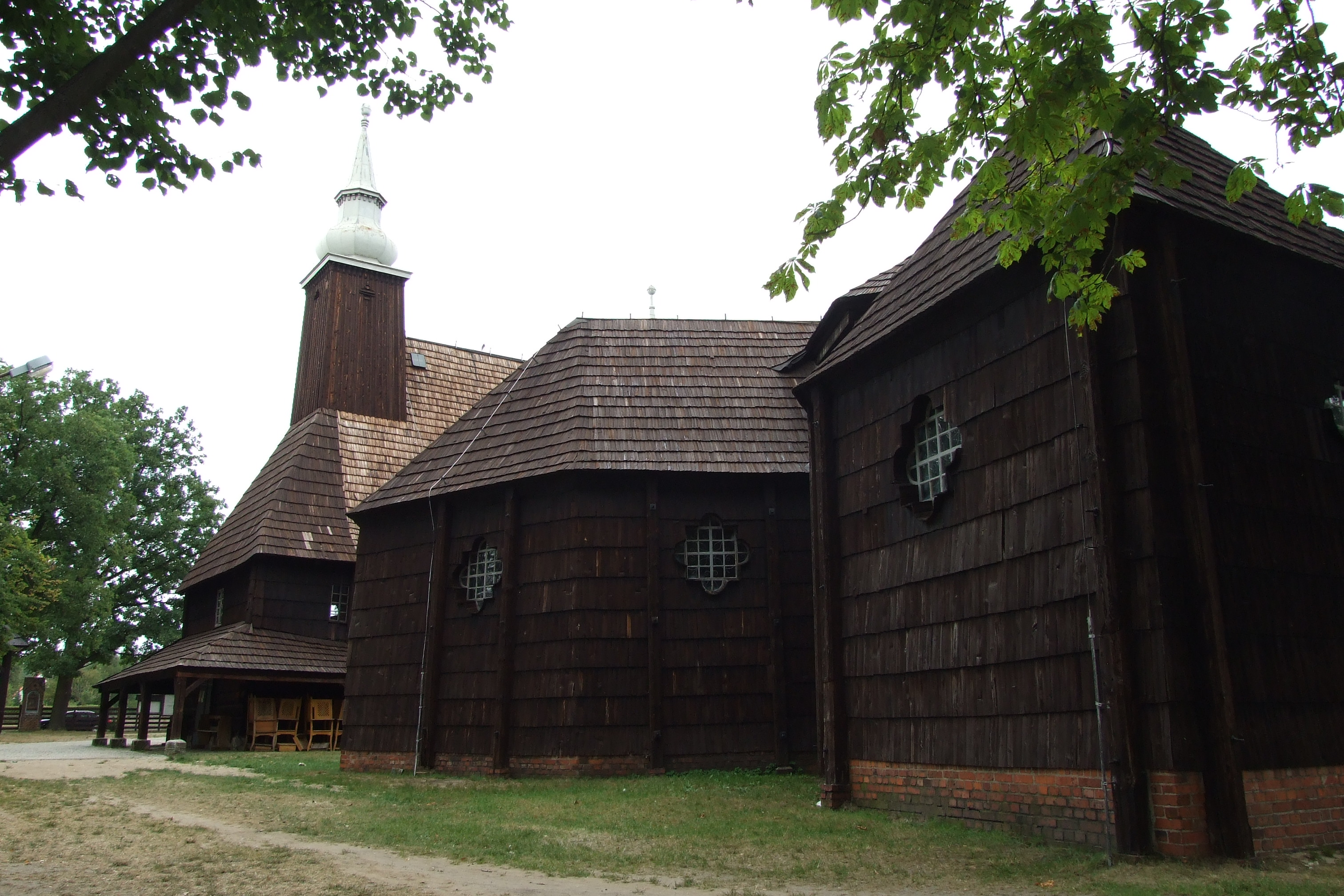 Kościół pw. św. Anny w Oleśnie